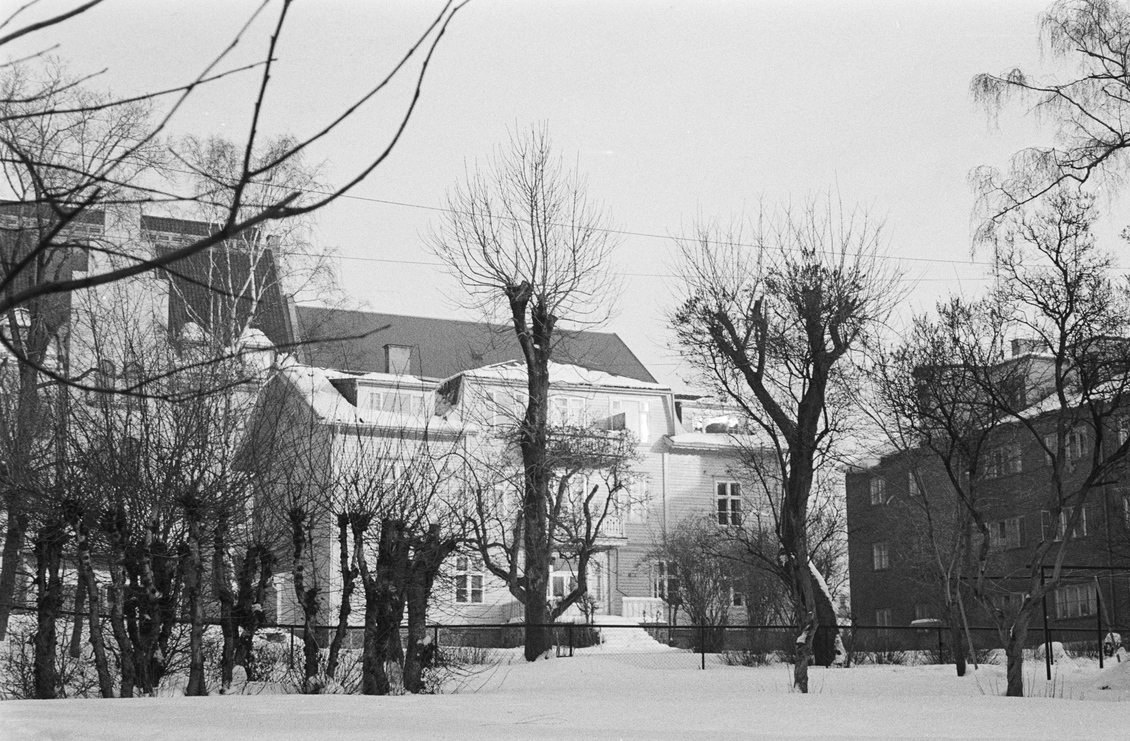 Gjenværende bygning ved løkken Frihedssæde i 1967, før den ble revet for å gi plass til et tilbygg for Kristelig gymnasium. Foto: Kari Paulsen, fra Byhistorisk samling hos Oslo Museum.